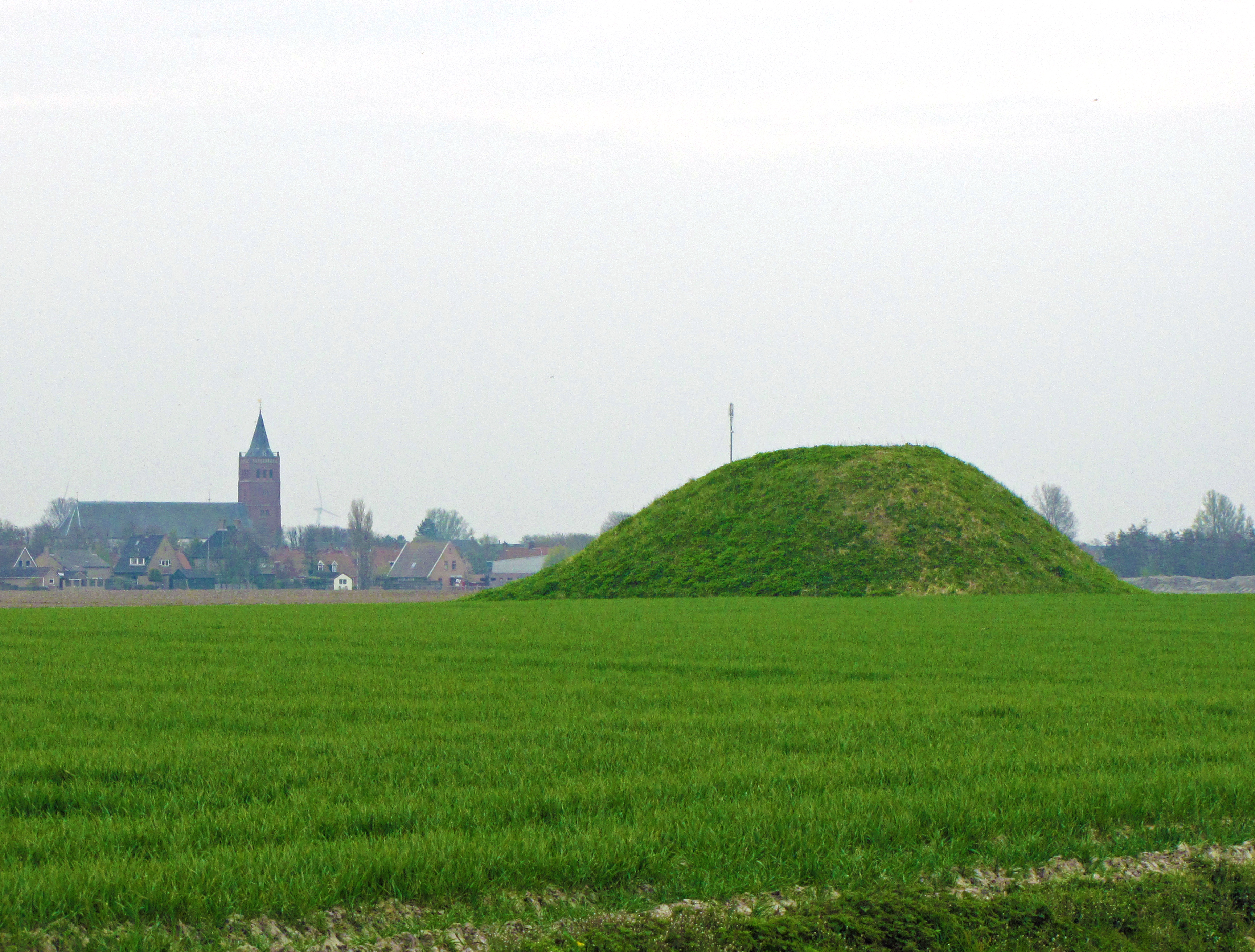 Stinswier ten oosten van Hoarnestreek 7 aan de Ottemaleane met het dorp Sexbierum op de achtergrond. Op de website wordt deze wier vermeld als Hege Wier op Goslingeland. In de voorlopige inventarisatie van middeleeuwse stinzen door P.N. Noomen (ook op die website) wordt daarnaast de naam Feyckema saete genoemd.